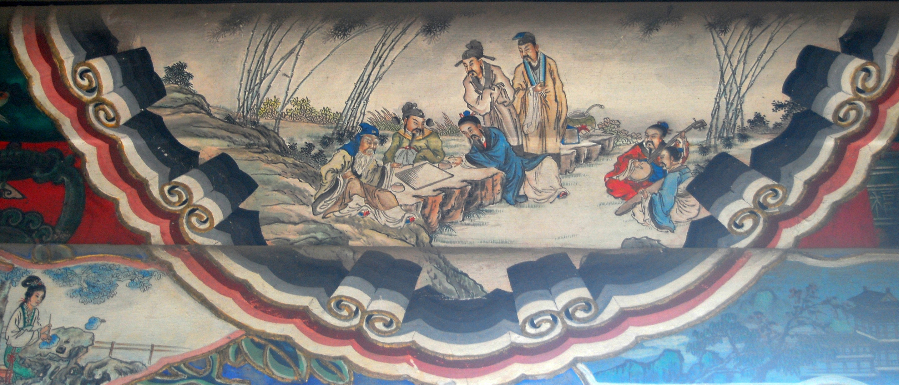 Trúc lâm thất hiền - Di Hòa Viên